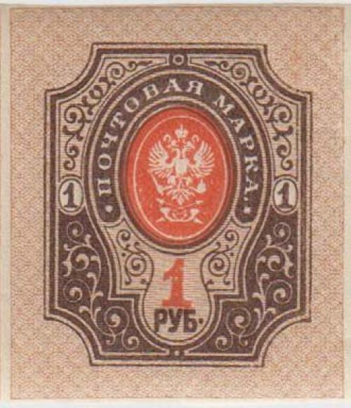 Музей: Гродзенскі дзяржаўны гісторыка-археалагічны музей Тып: выяўленчыя крыніцы Від: графіка прыкладная Прадметнае імя: марка паштовая Назва/аўтарская назва: "1 рубль" Матэрыялы: папера; Тэхналогіі стварэння: друк; Дата стварэння: 19017 г. Месца стварэння: Расійская Імперыя Памеры: 32 х 28 мм